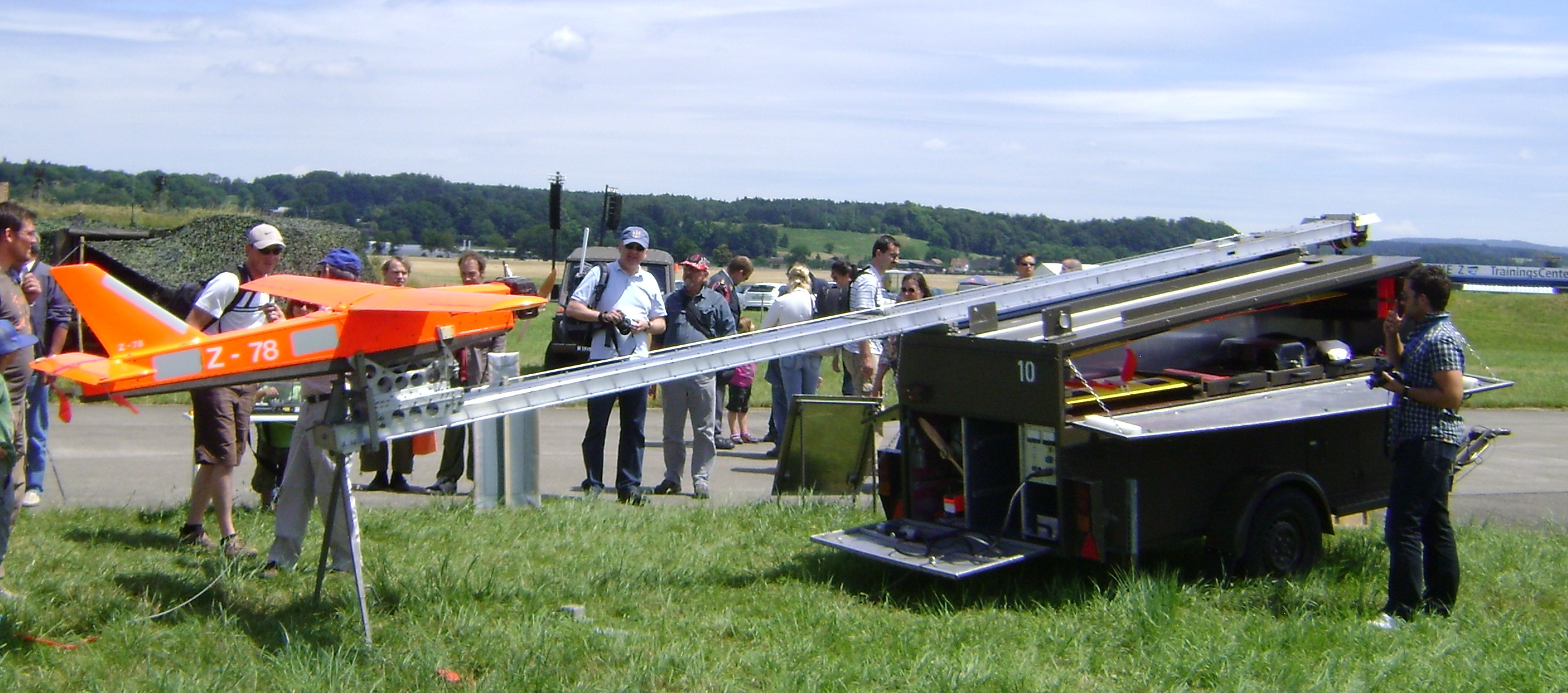 Swiss Ar Force Targed UAV